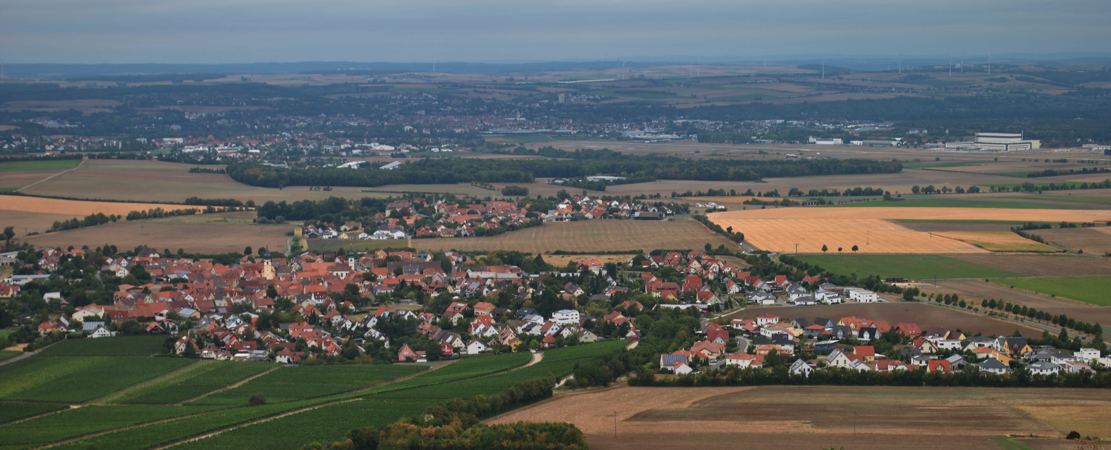 Panorama Rödelsee, Fröhstockheim im Hintergrund Kitzingen, vom Schwanberg aus